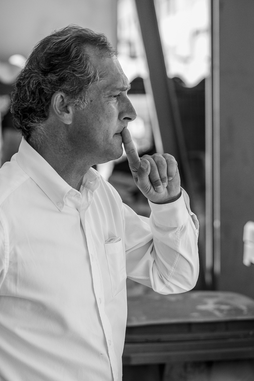 Retrato de Arturo Berned